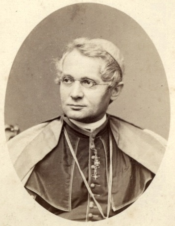 Kardinal Lajos Haynald, Kalocsa-Kecskemét, Ungarn